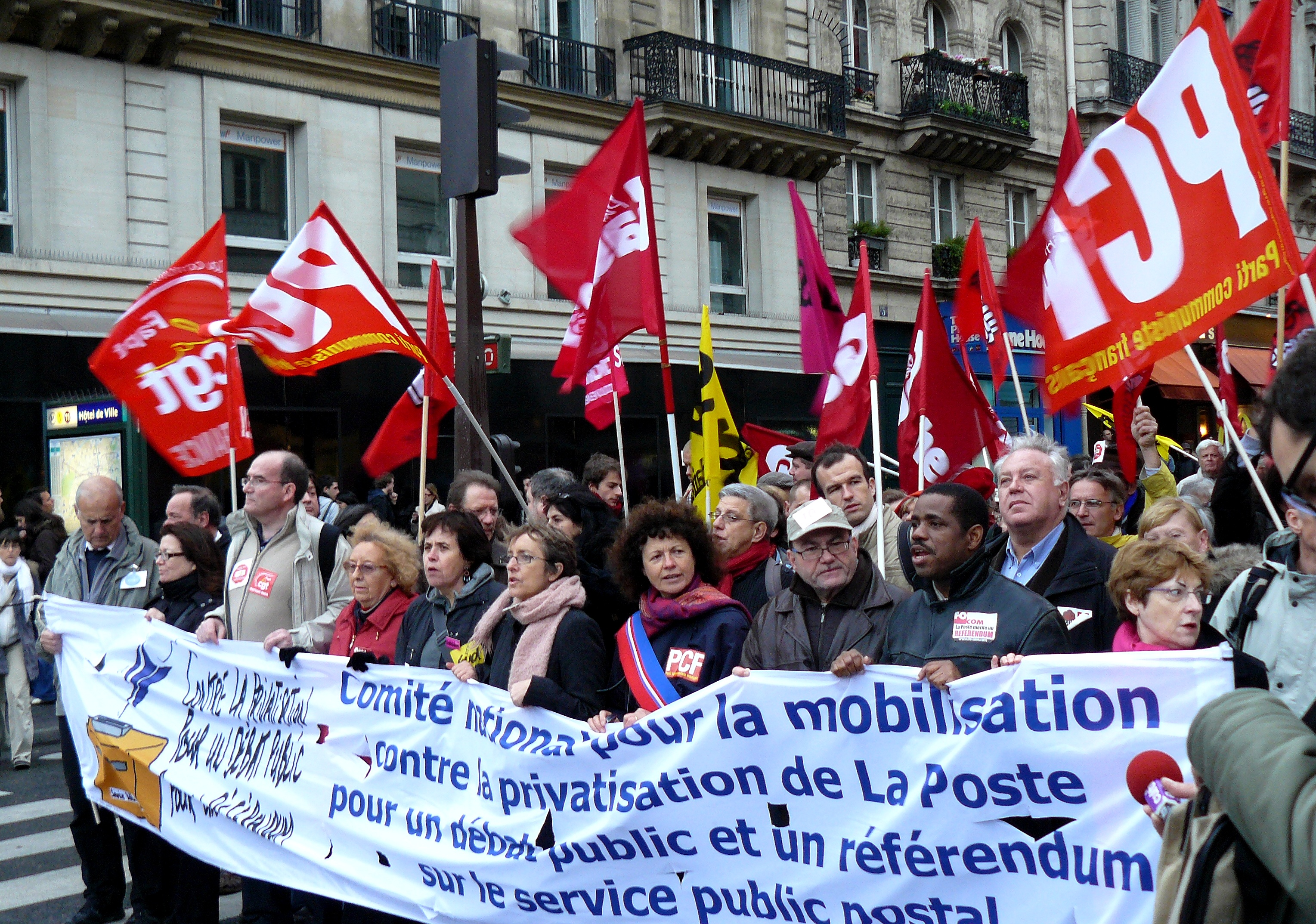 Manifestation dans Paris du Collectif contre la privatisation de la Poste, le 28 novembre 2009 - Arrivée parvis de l'Hôtel de Ville.